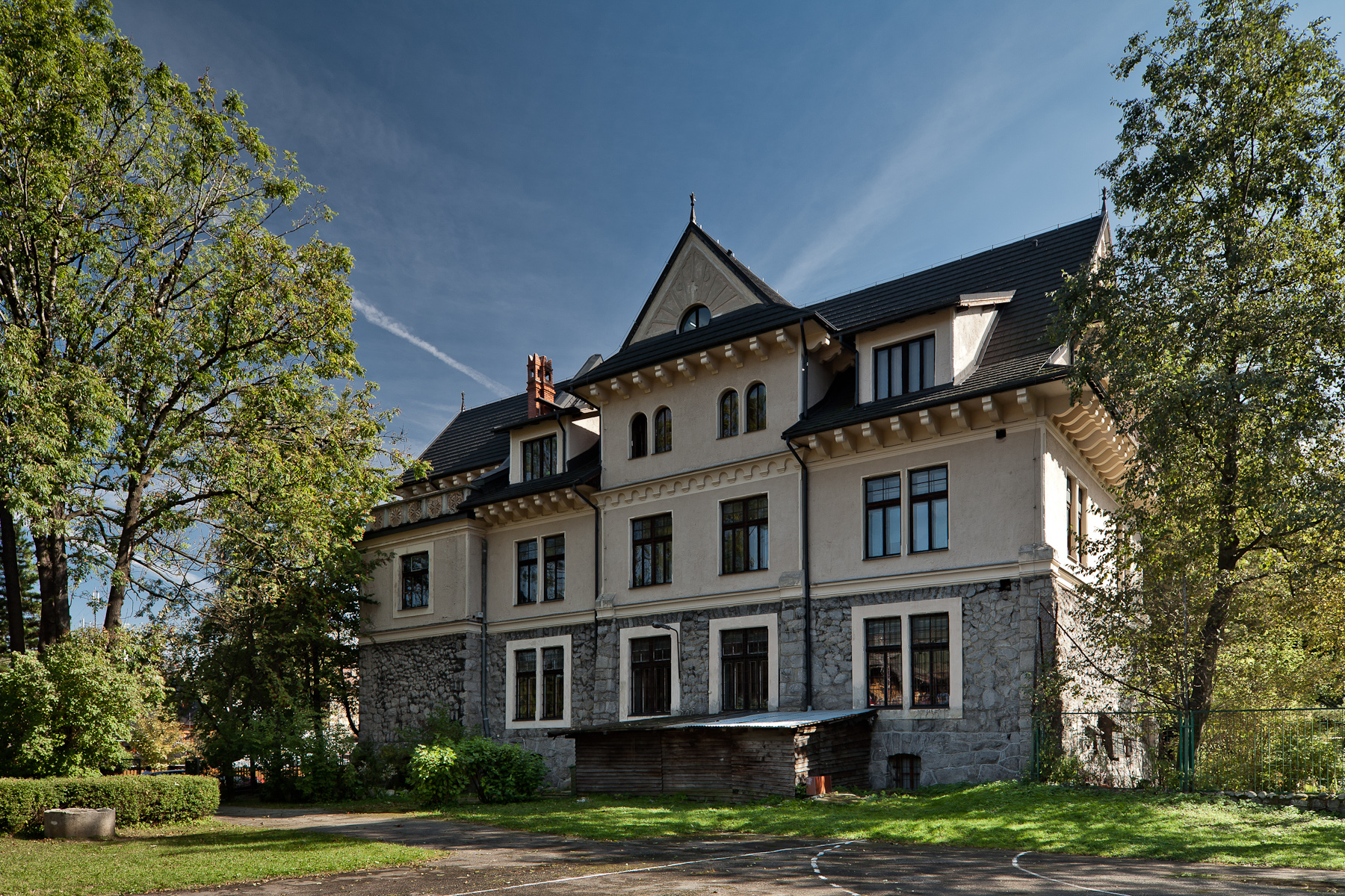 Muzeum Tatrzańskie, Zakopane